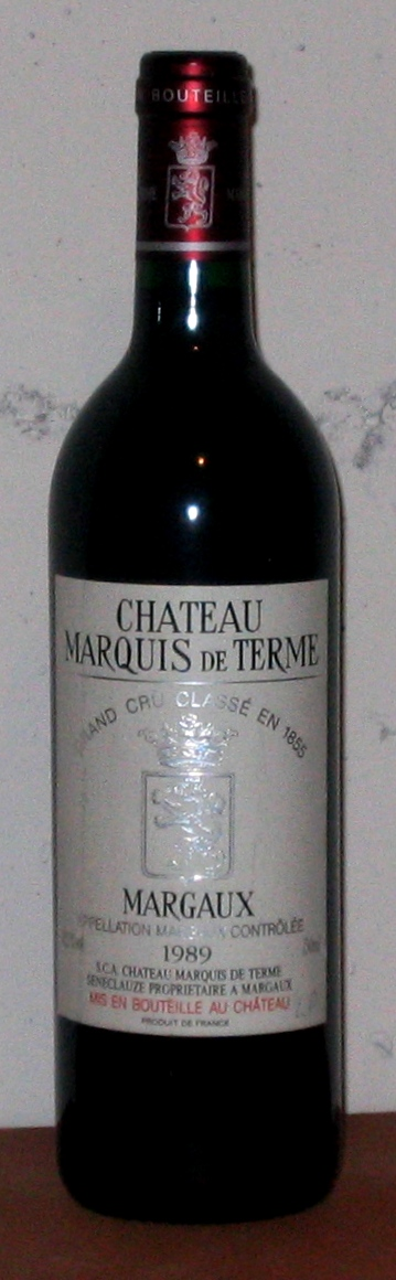 Chateau Marquis de Terme